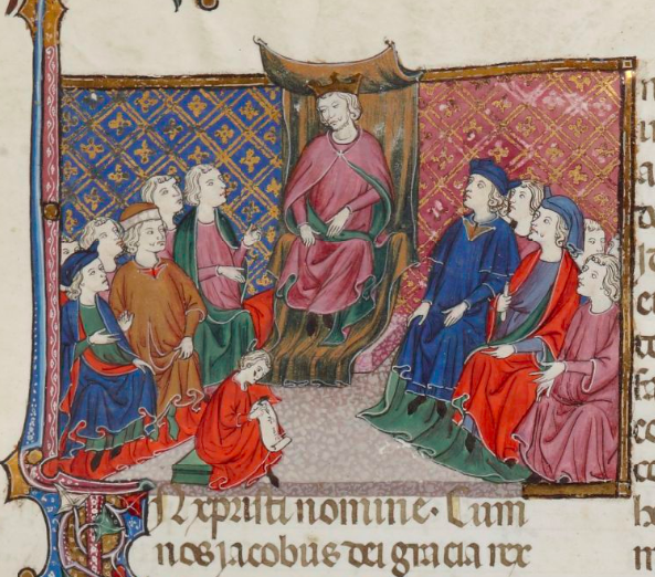 parlement de lérida (1301)